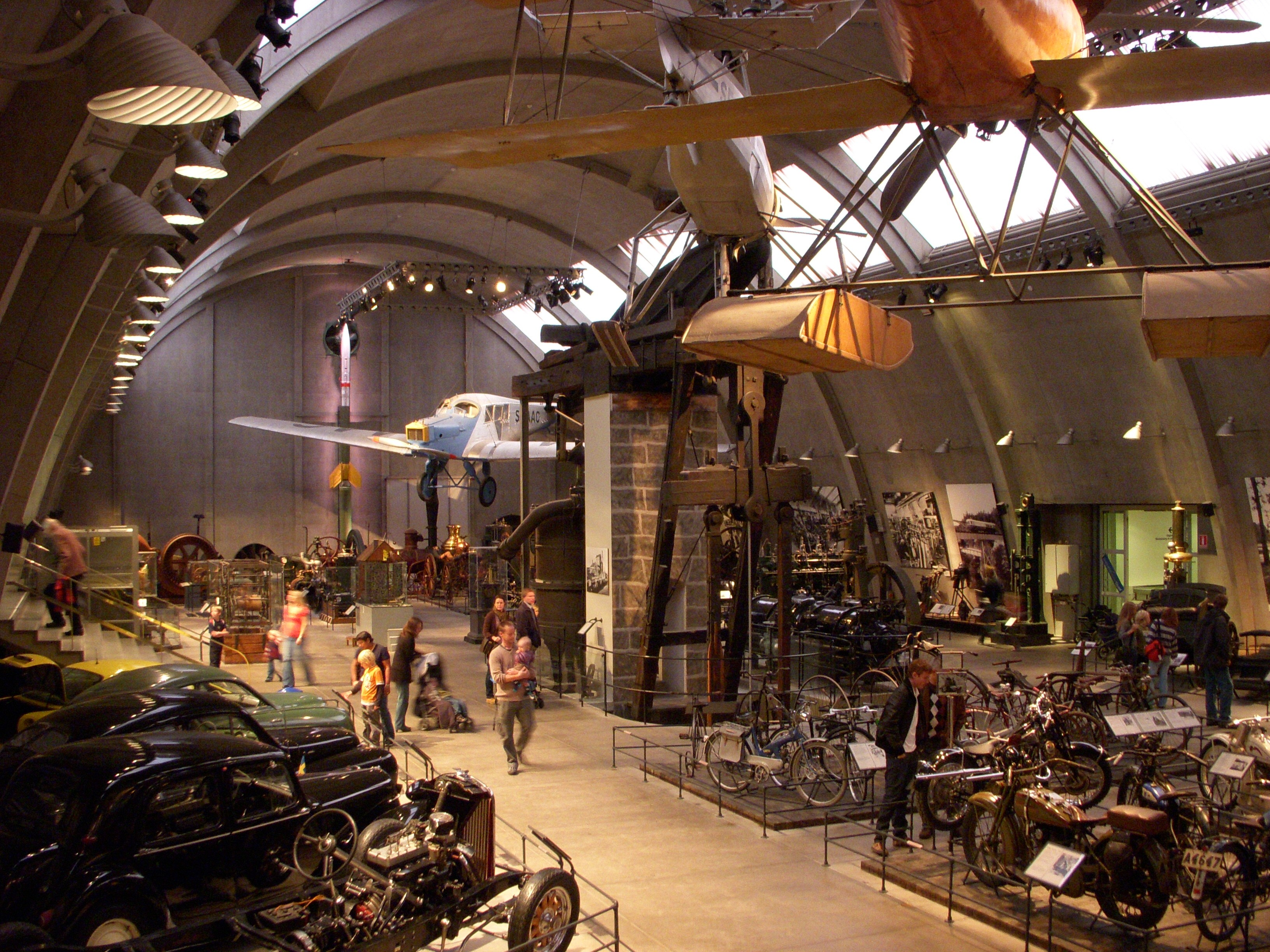 Tekniska museet i Stockholm, maskinhallen